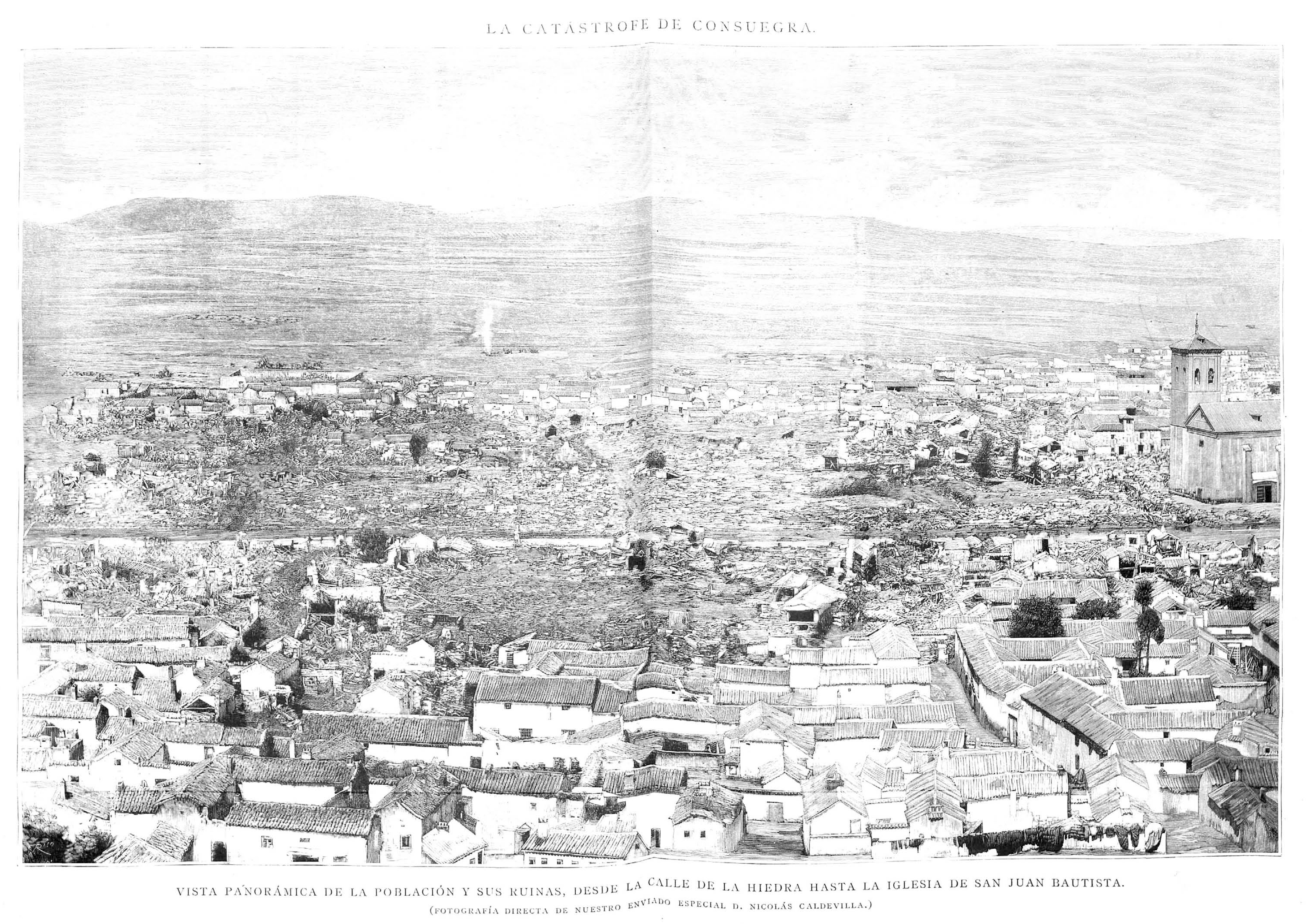 La catástrofe de Consuegra. Vista panorámica de la población y sus ruinas, desde la calle de la Hiedra hasta la iglesia de San Juan Bautista (Fotografía directa de nuestro enviado especial D. Nicolás Caldevilla).